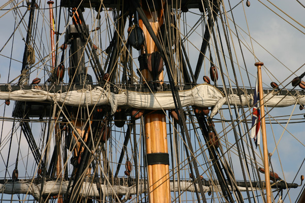 Het schip Endeavour (een identieke kopie) van de Engelse ontdekkingsreiziger James Cook. Foto genomen in de haven van Antwerpen in 2004.